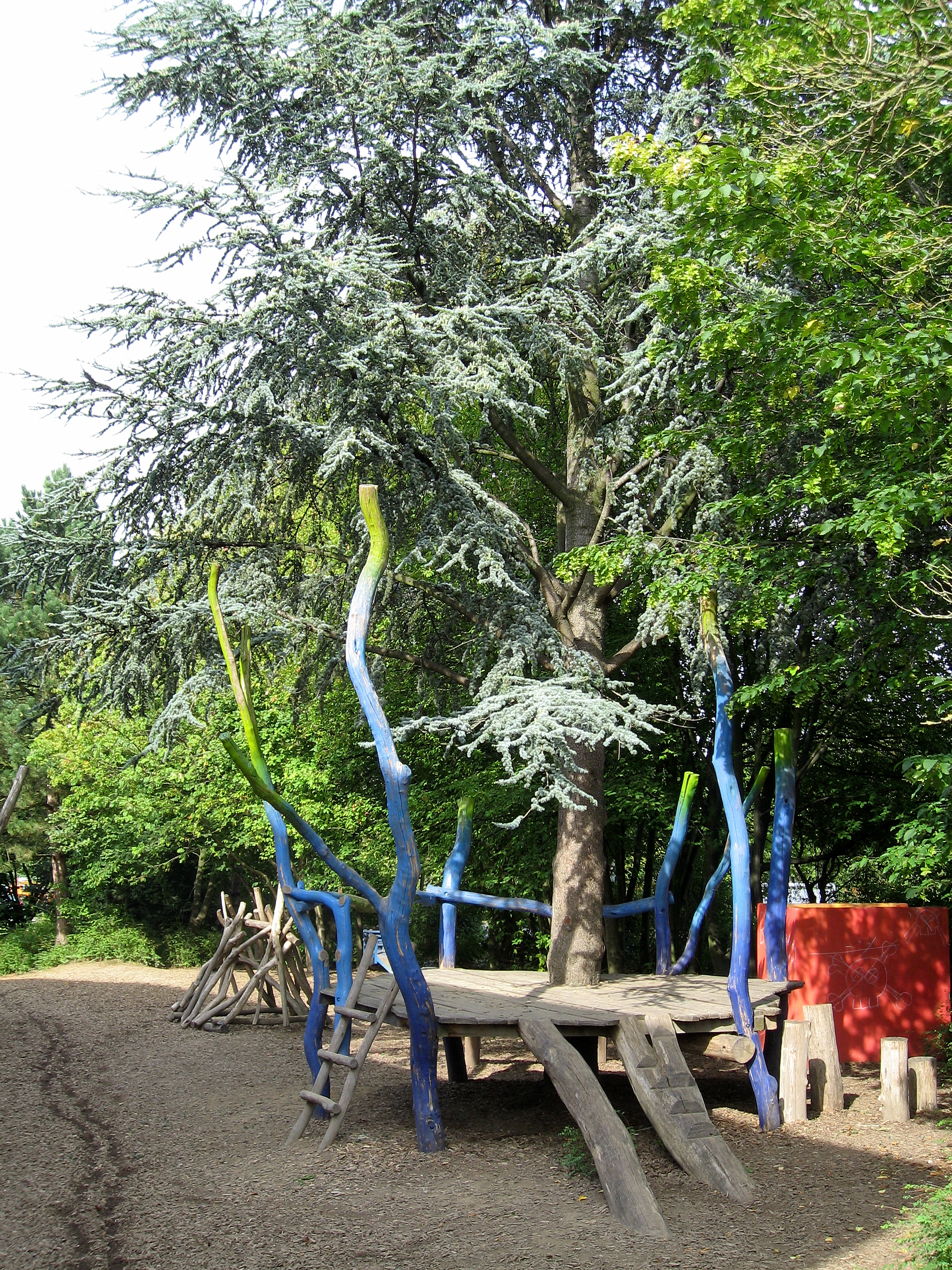 Dortmund, Brünninghausen, Anthroposophen, Architektur, Spielplatz